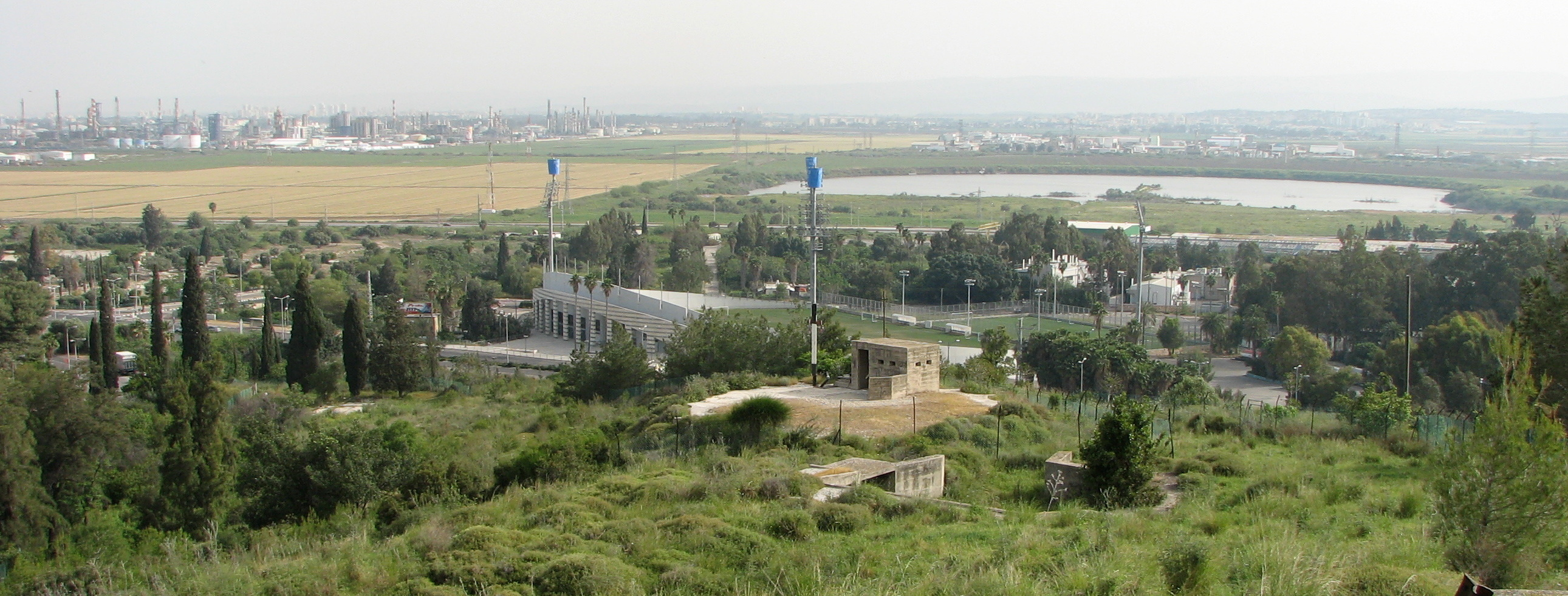 Nesher Old Quarry belongs to "Nesher Israel Cement Enterprise". Was opened on 1925 and closed on 1942. The quarry was reconstructed. Now in the city Nesher המחצבה הישנה של נשר מפעלי מלט ישראליים נפתחה בשנת 1925 ונסגרה בשנת 1942 לאחר שמקורות אבן הסיד התדלדלו. המחצבה עברה שיקום המשך השנים. בטח המחצבה מספר בארות ששימשו את בית החרושת ואת היישוב נשר בשנותיו הראשונות ביצורים מתקופת המנדט הבריטי